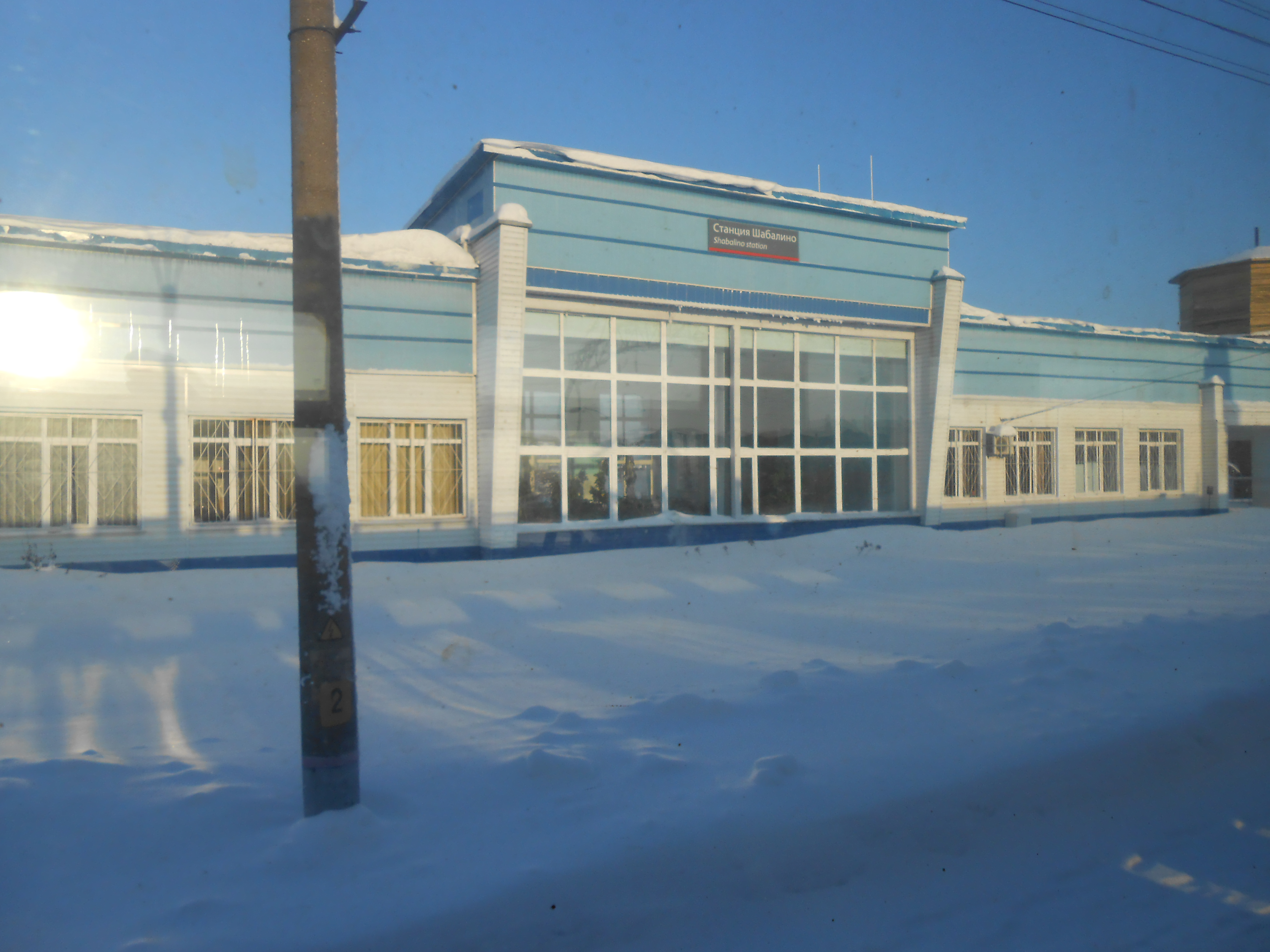 Железнодорожная станция Шабалино Северной железной дороги в посёлке Ленинское Кировская область.